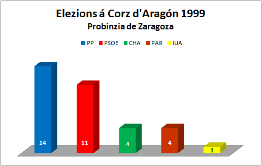 Aragonés: Grafico d'as elezions á Corz d'Aragón de la añada 1999. Resultatos d'a probinzia de Zaragoza.